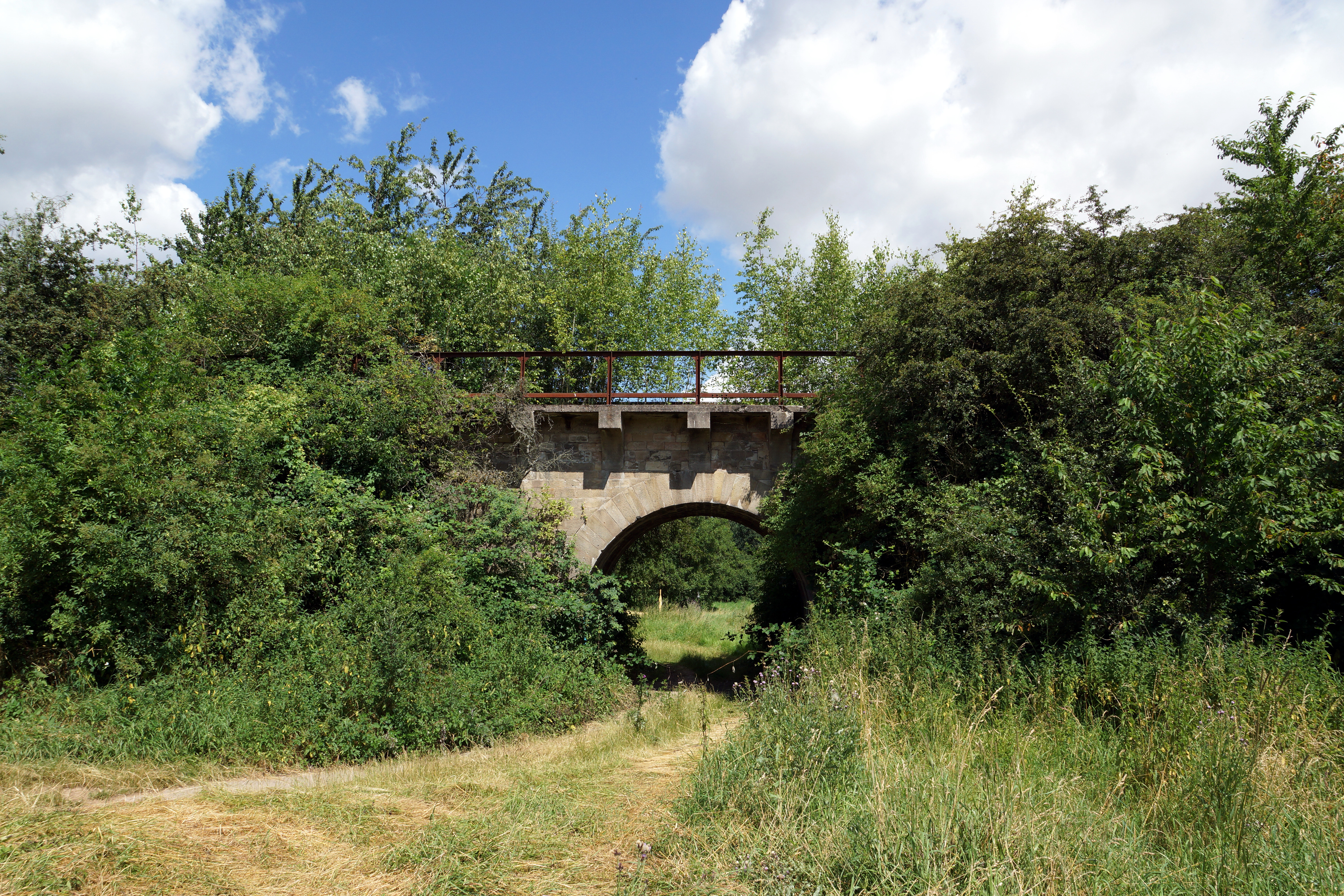 Steinbogenbrücke an der ehemaligen Bahnstrecke Ebertsheim-Hettenleidelheim, Streckenkilometer 2,396